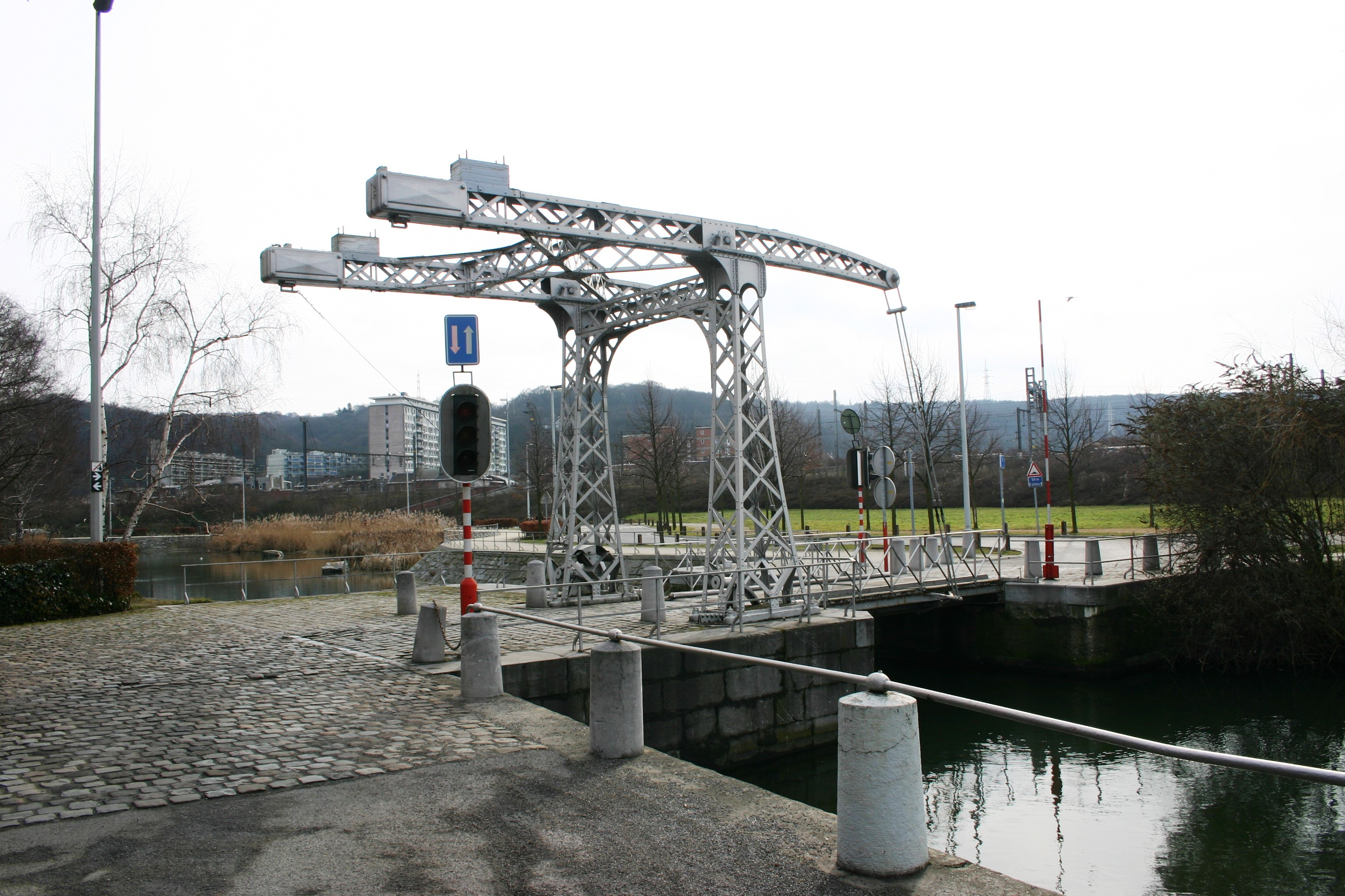 Marcotty Bréck.